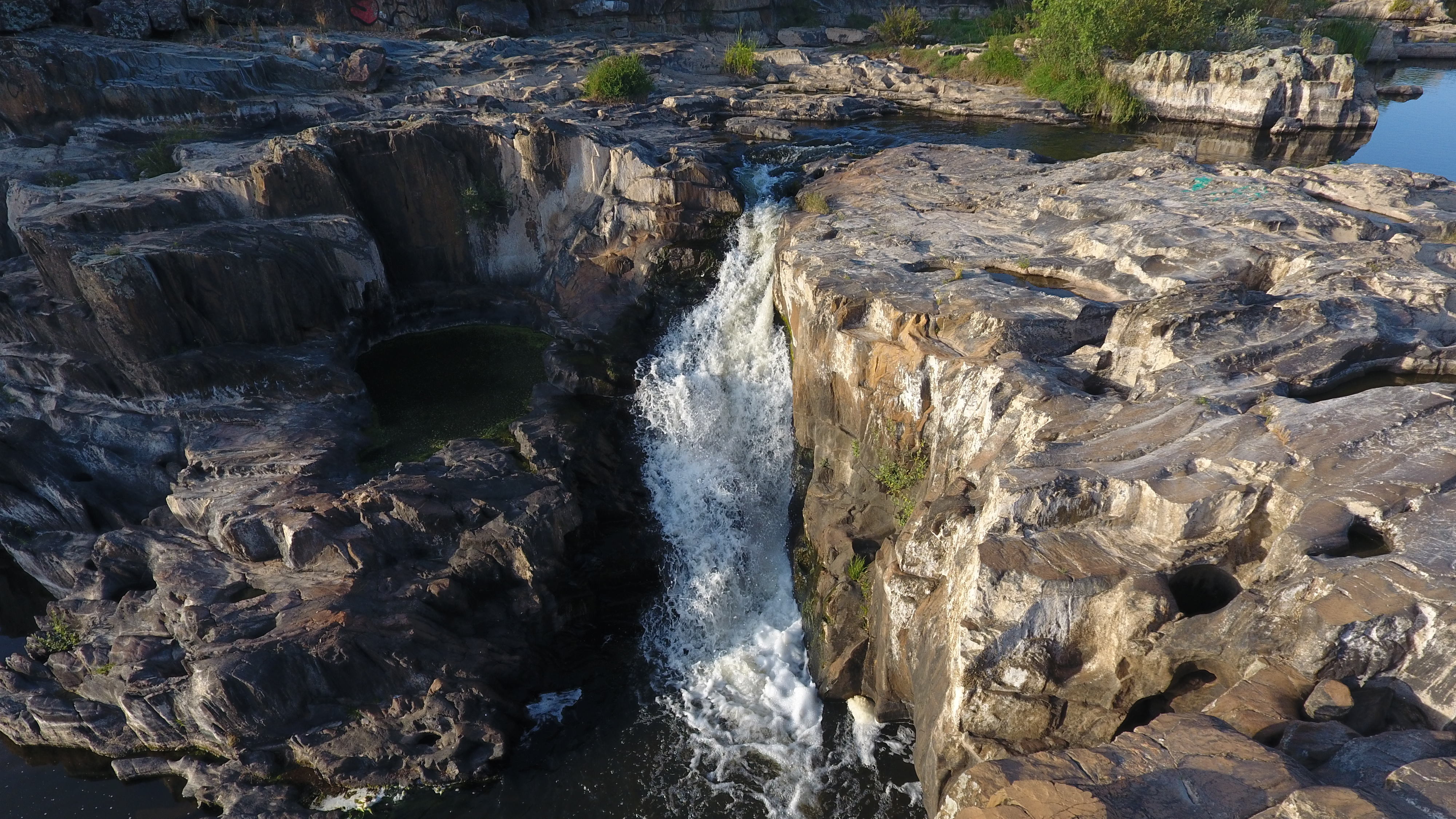 Cascada que nos encontramos a 3 km del núcleo urbano de Moraleja